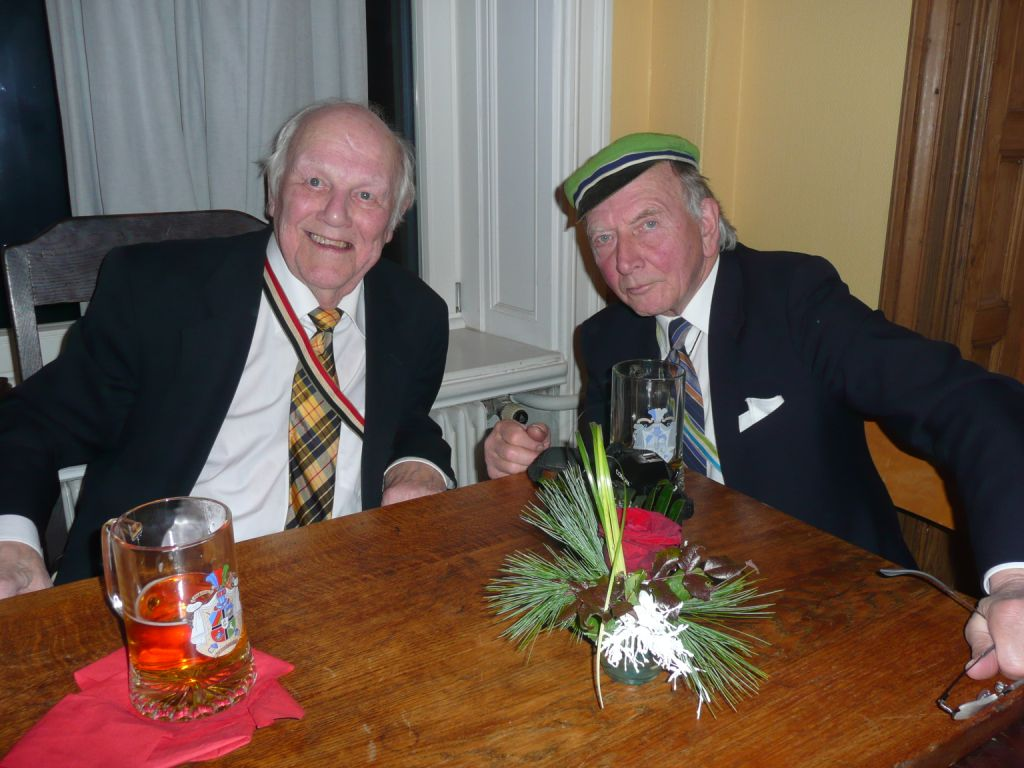 Wilhelm Röhl und Gert Henning beim Academischer Club zu Hamburg